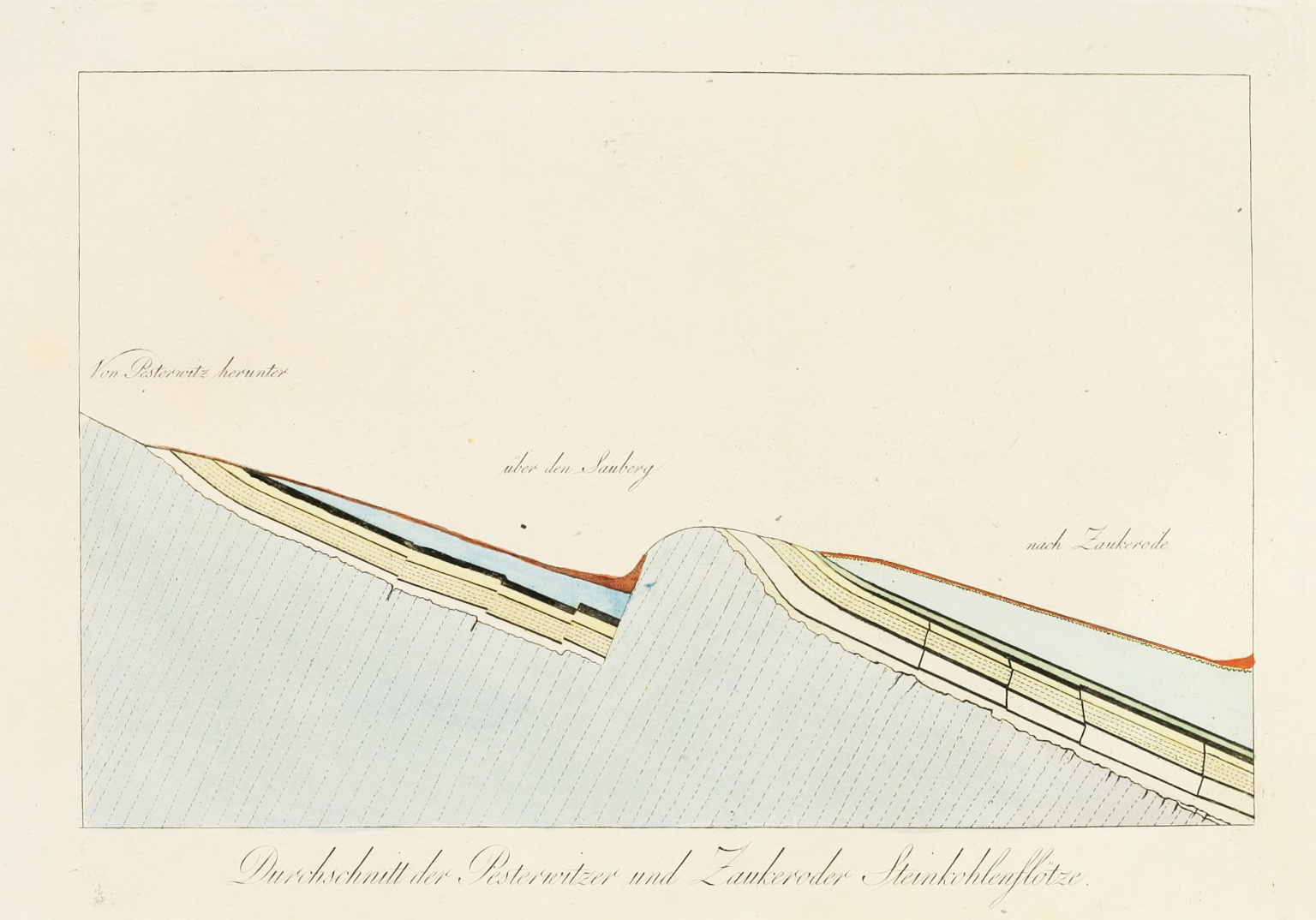 Abbildungen aus " Der Plauische Grund bei Dresden mit Hinsicht auf Naturgeschichte und schöne Gartenkunst" und "Mineralogische Beschreibung des Plauischen Grundes bis Tharand"